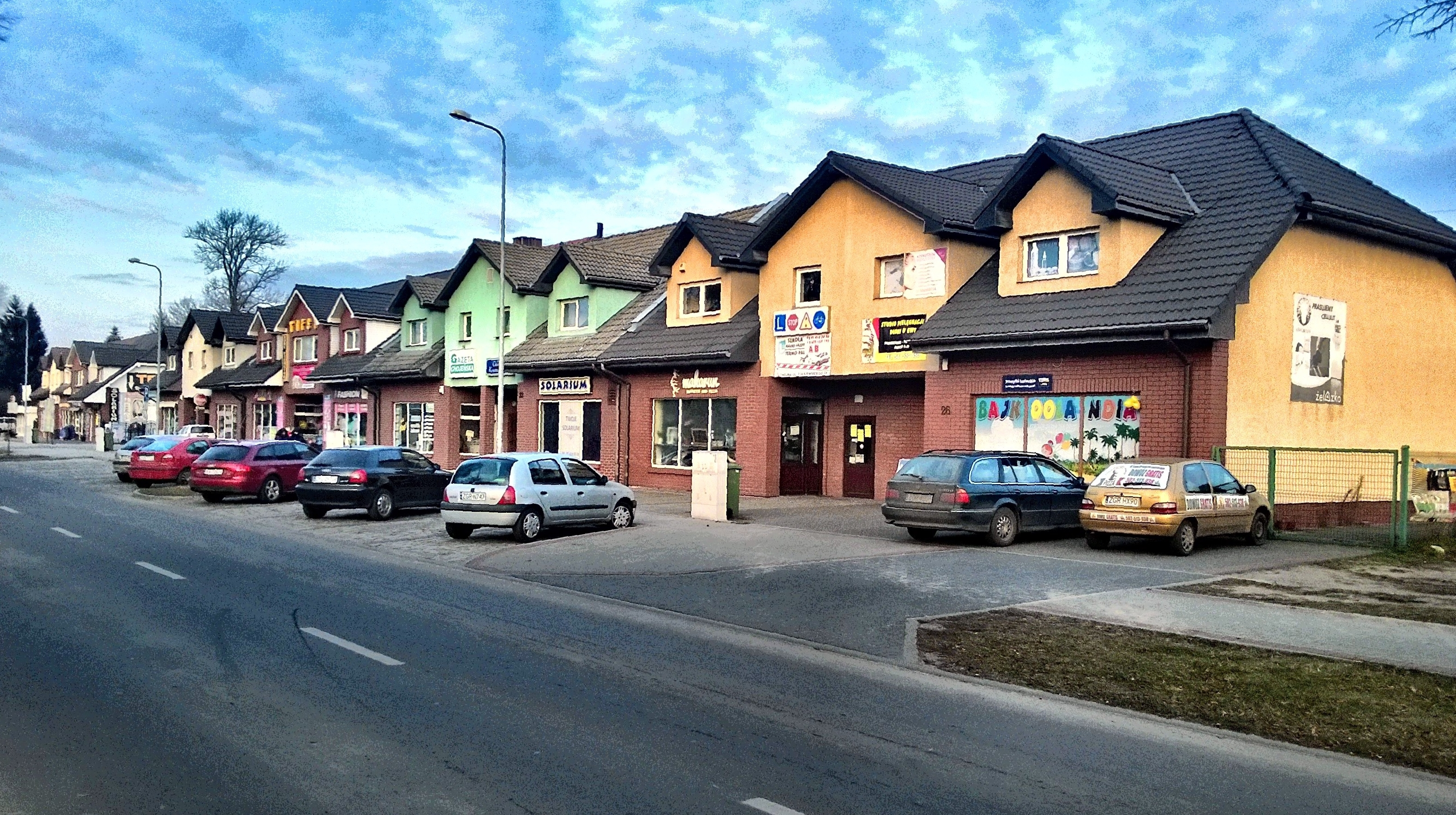 Chojna, Poland